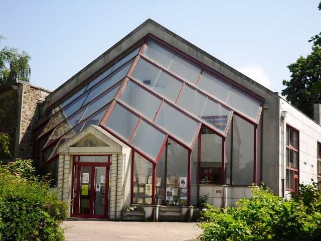 La bibliothèque Raymond Queneau de Limours (91)